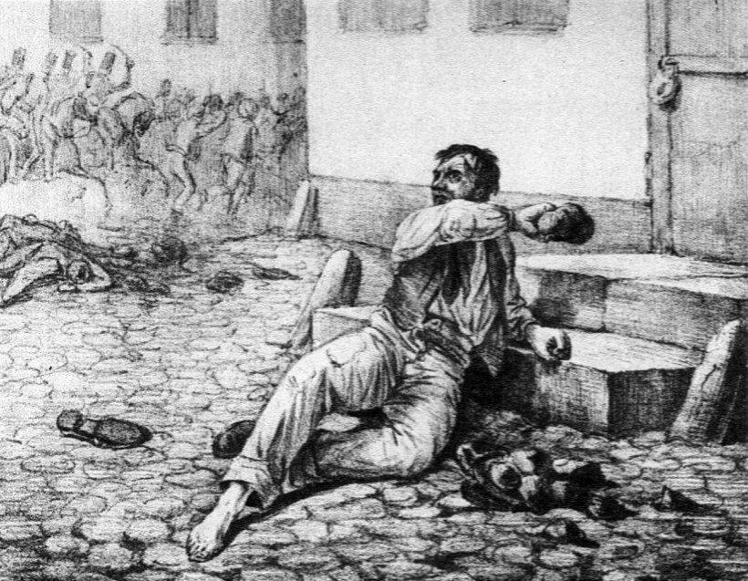 Scen från Crustenstolpeskravallerna 1838. Satirteckning av Ferdinand Tollin.